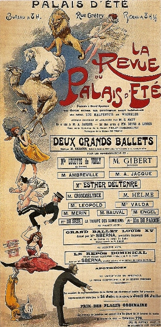 La Revue du Palais d’été / Rue Gretry / fantaisie à grand Spectacle ... de MM. Luc MALPERTUIS et WICHELER / Musique Nouvelle et arrangée par M. G. NAZY Mise en scène de M.A. JACQUE - Sept décors nouveaux de MM. DEVIS & LYNEN... IMPRIMEUR : Imp. ED. FUYTYNCK, Bruxelles en collaboration Léon GROETAERT Imp. ED. FUYTYNCK, Bruxelles en collaboration Léon GROETAERT Timbrée : 12 juillet 1904 Doublée sur papier japon